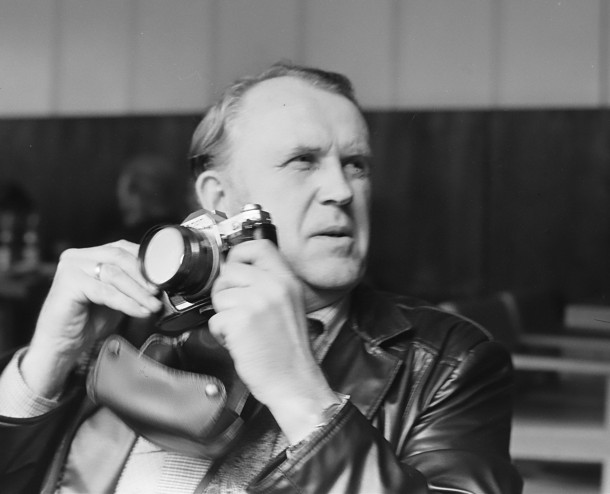 Arvo Tarmula, pressifotograaf 1984